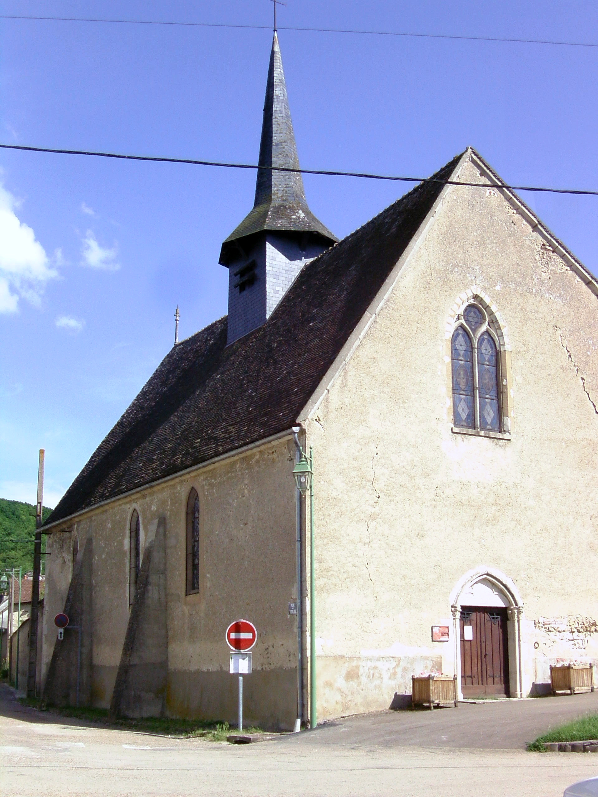 Église saint fiacre de villevallier (Yonne - France)